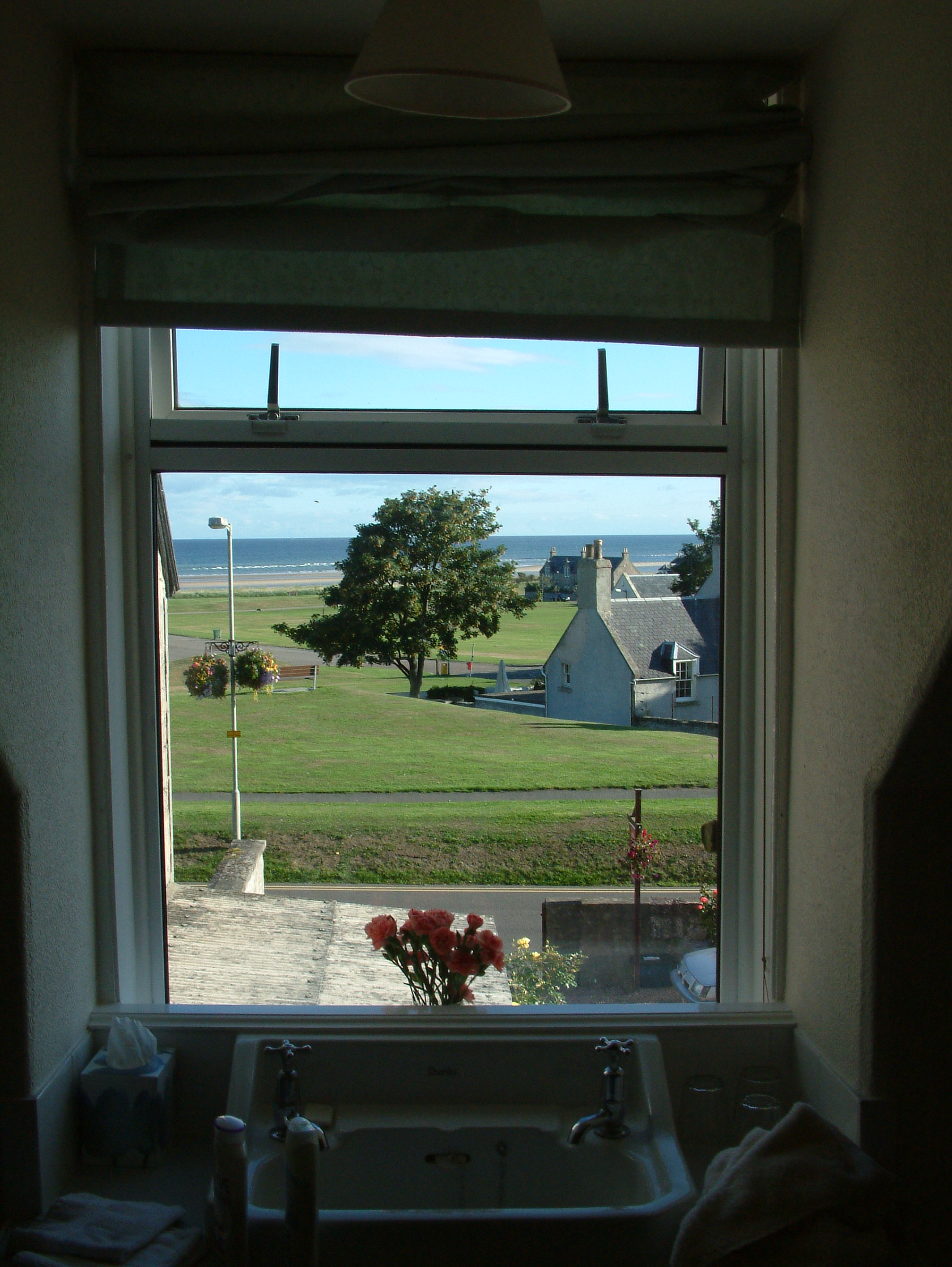 Nairn.